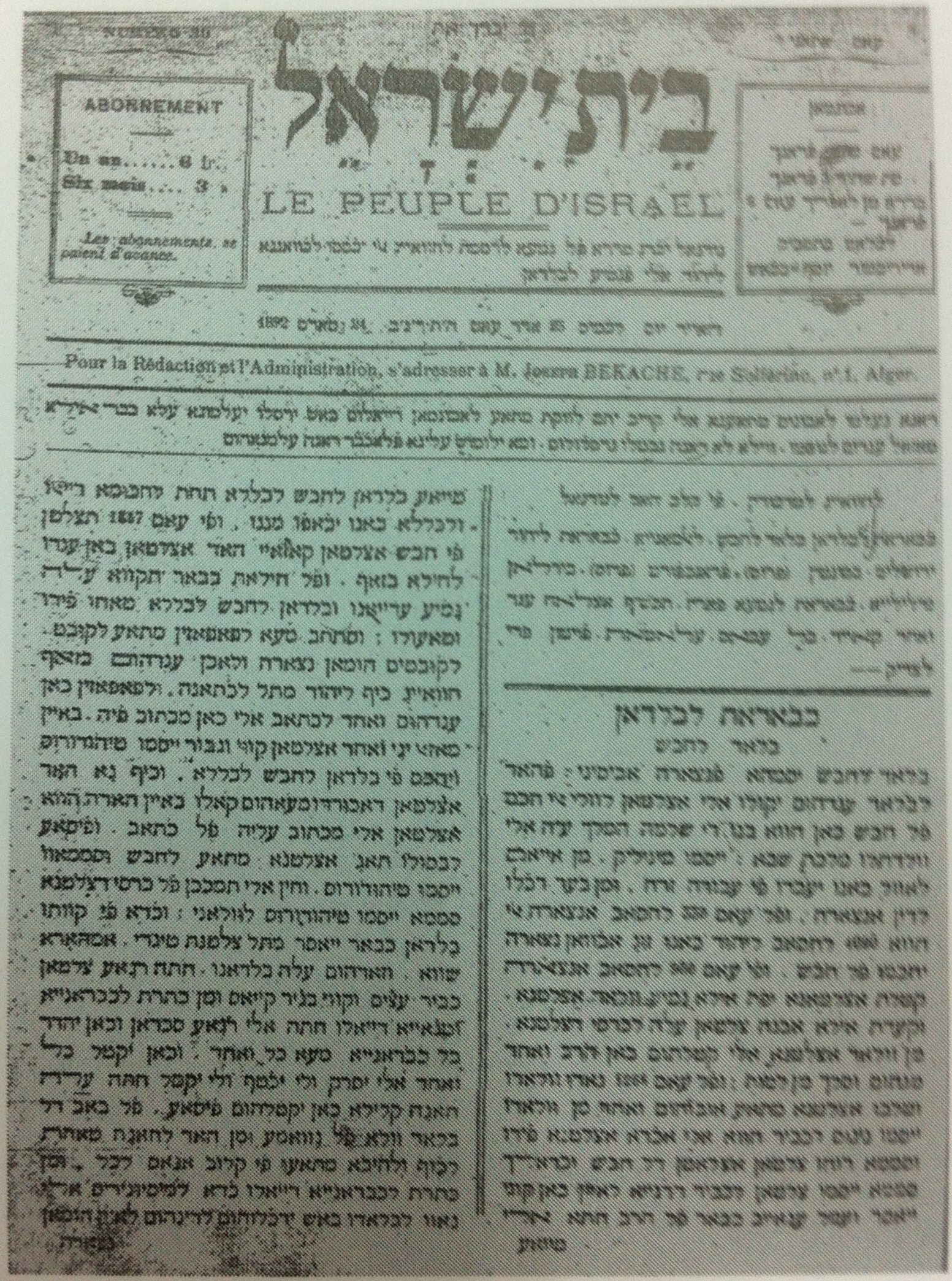 "Beit Israel" (house of israel, בית ישראל) a Judeo-Arabic journal published in Algeria between 1890-1892.